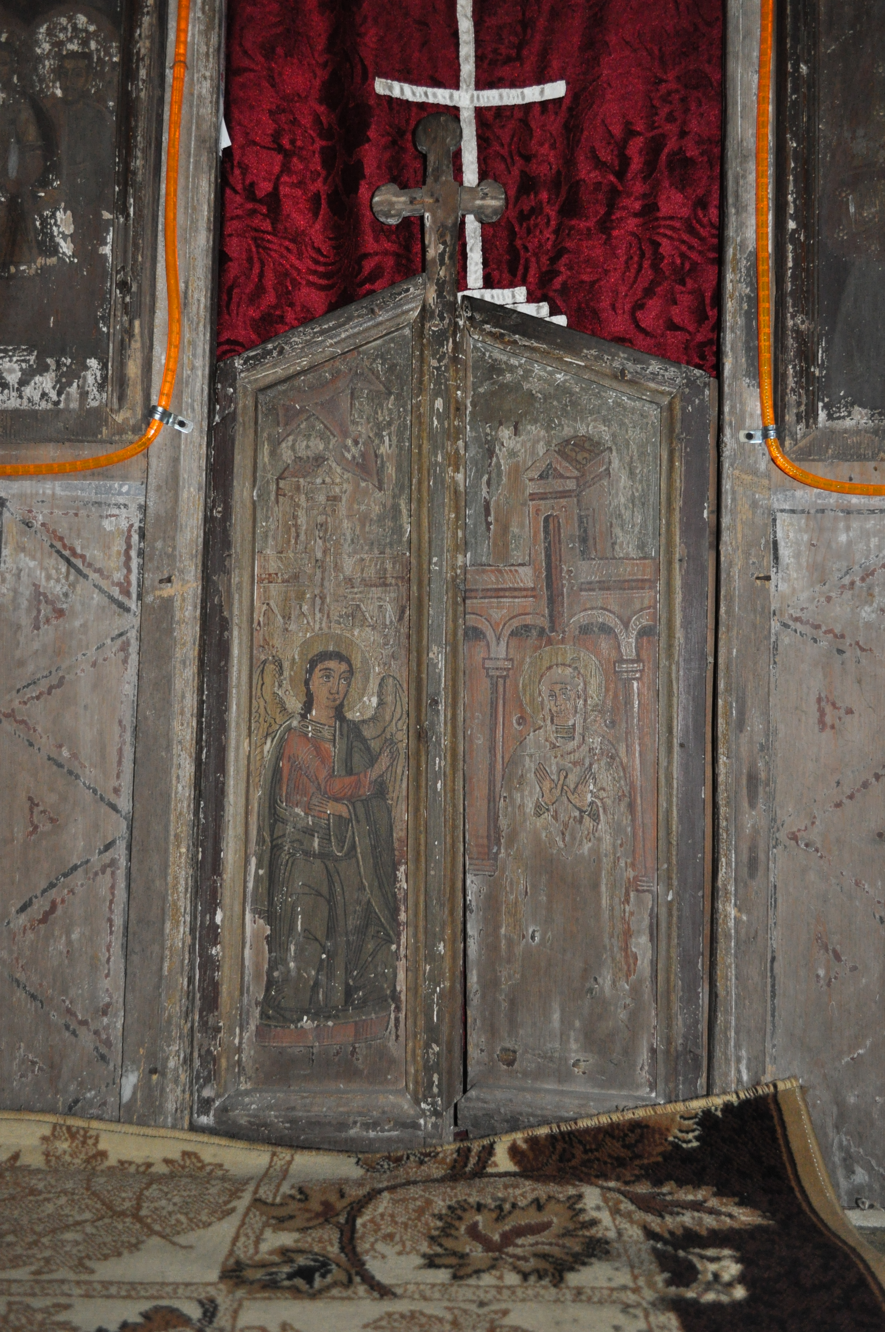 Biserica "Înălţarea Domnului" , sat NUCŞOARA; comuna SĂLAŞU DE SUS